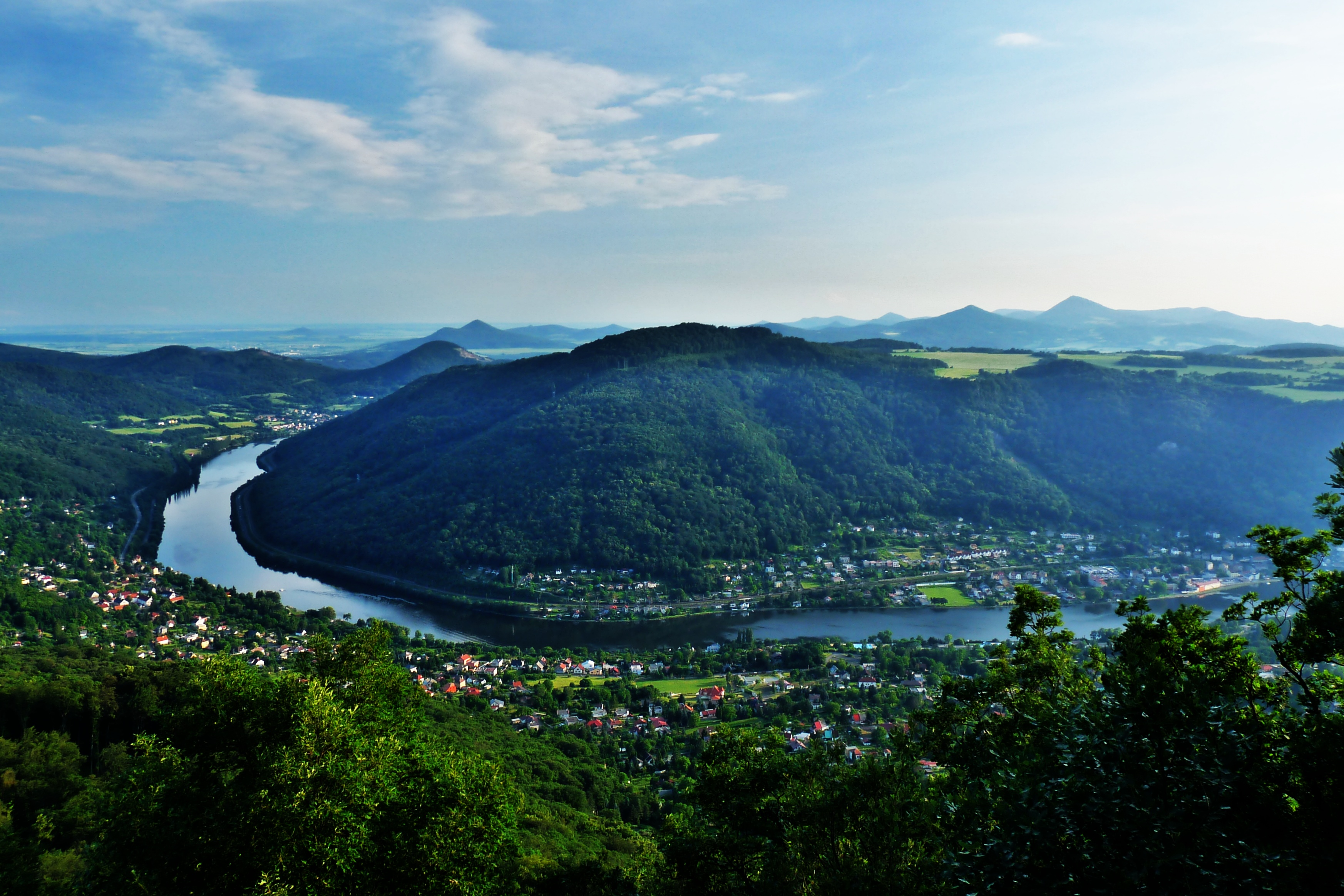 České středohoří z vrchu Vysoký Ostrý (587 m n. m.), v popředí je Brná, na protějším břehu Labe je Vaňov.